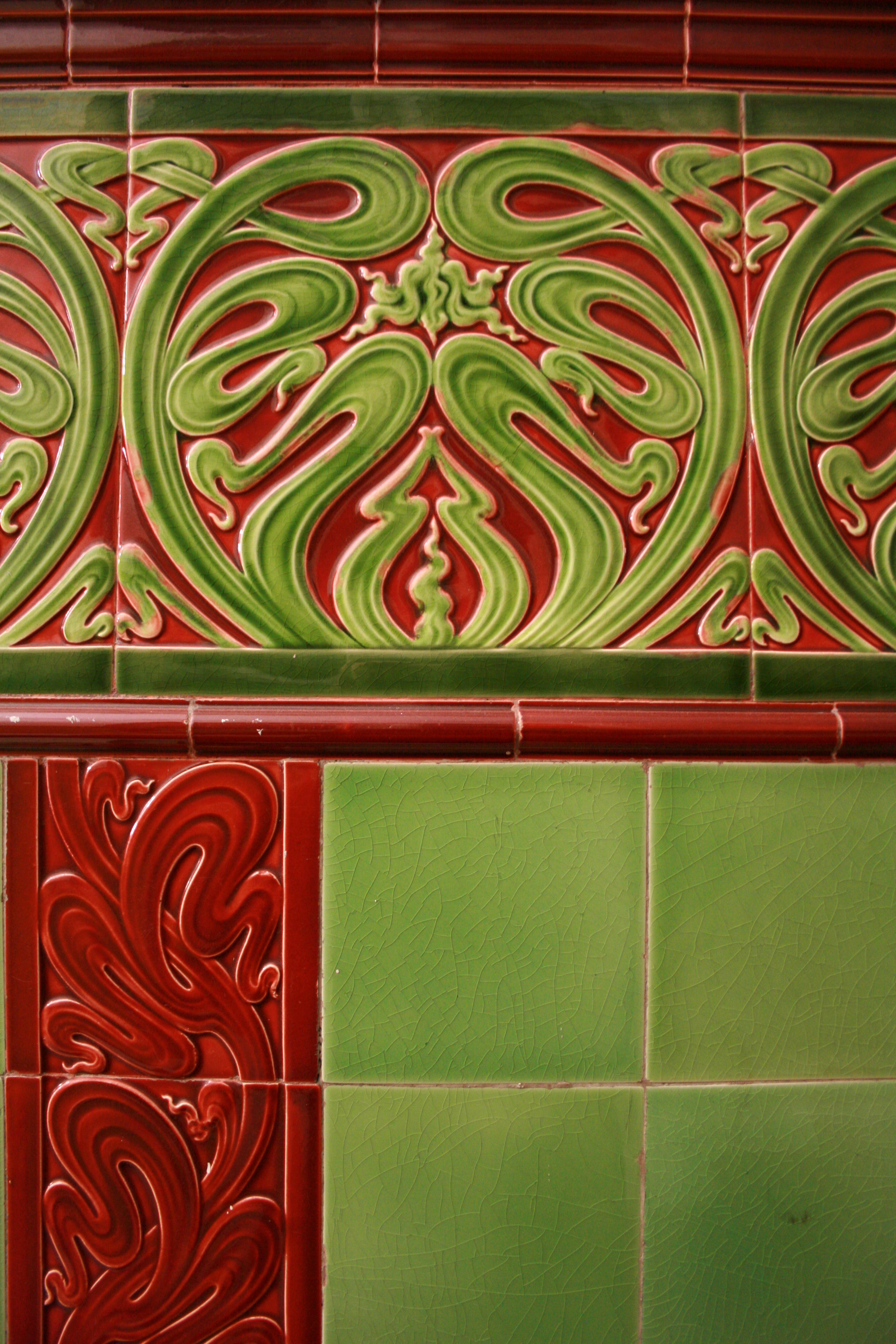 Association Parlementaire Européenne